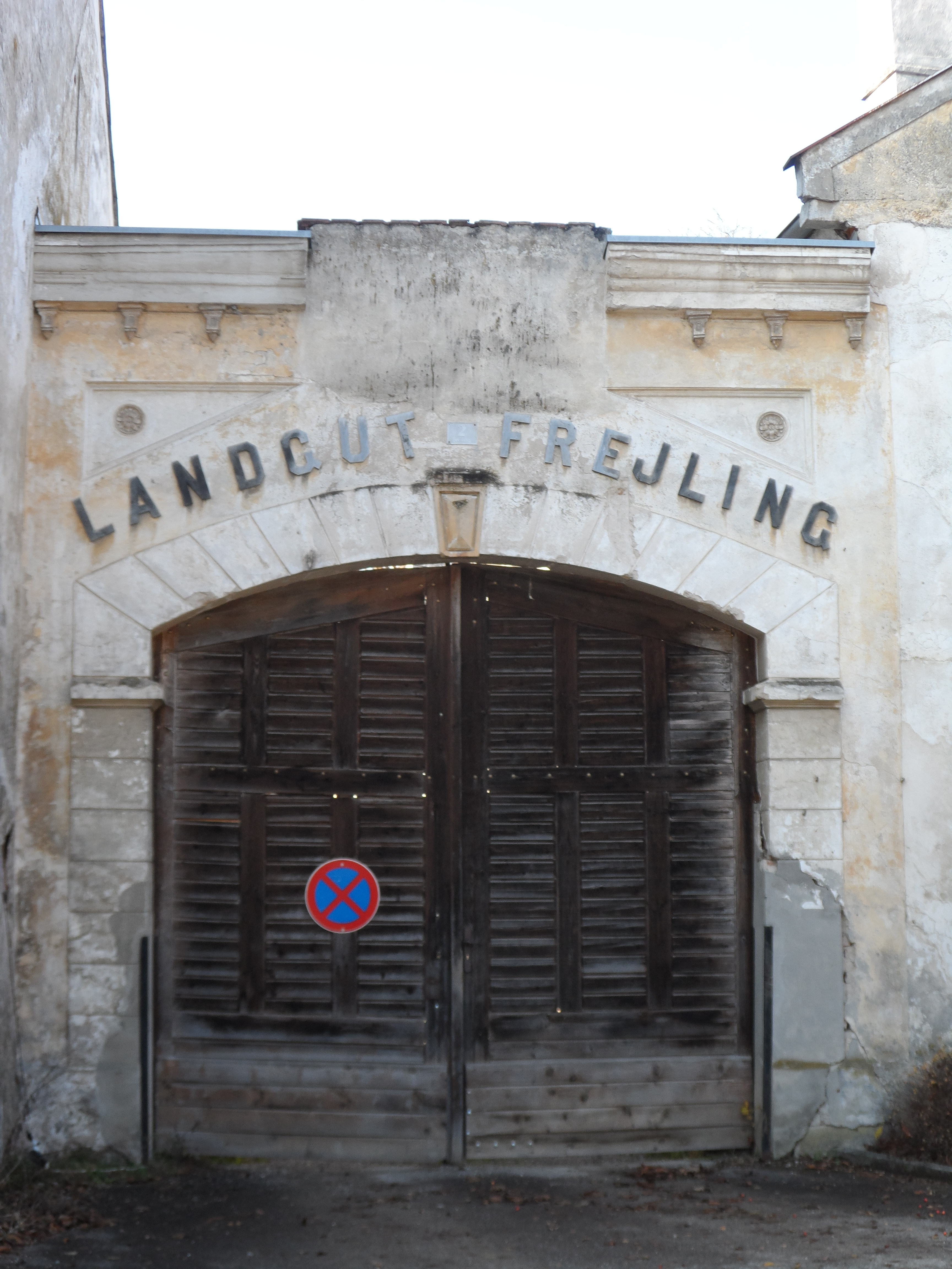 Wasserschloss Freiling Eingang Landgut Frejling